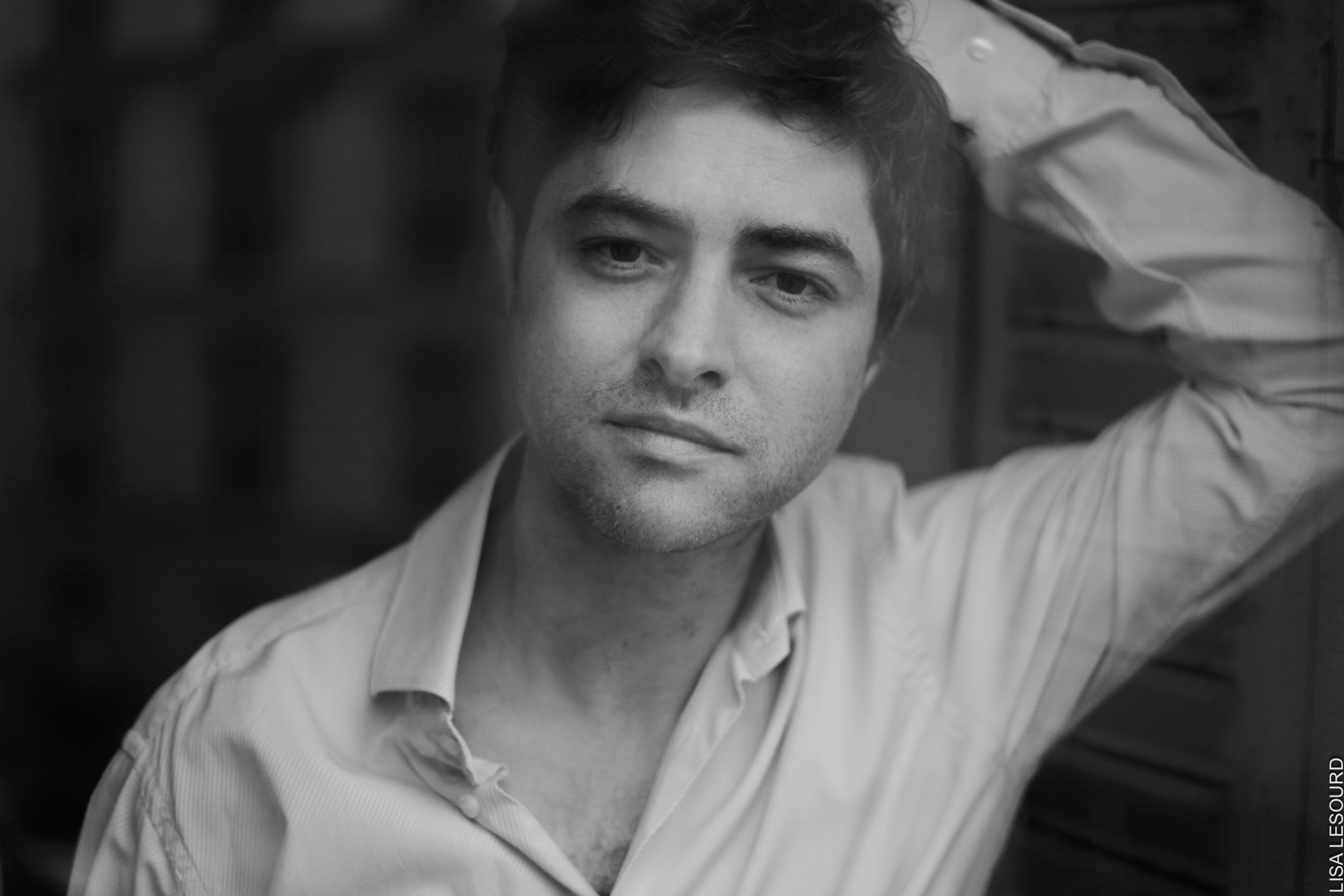 photographie